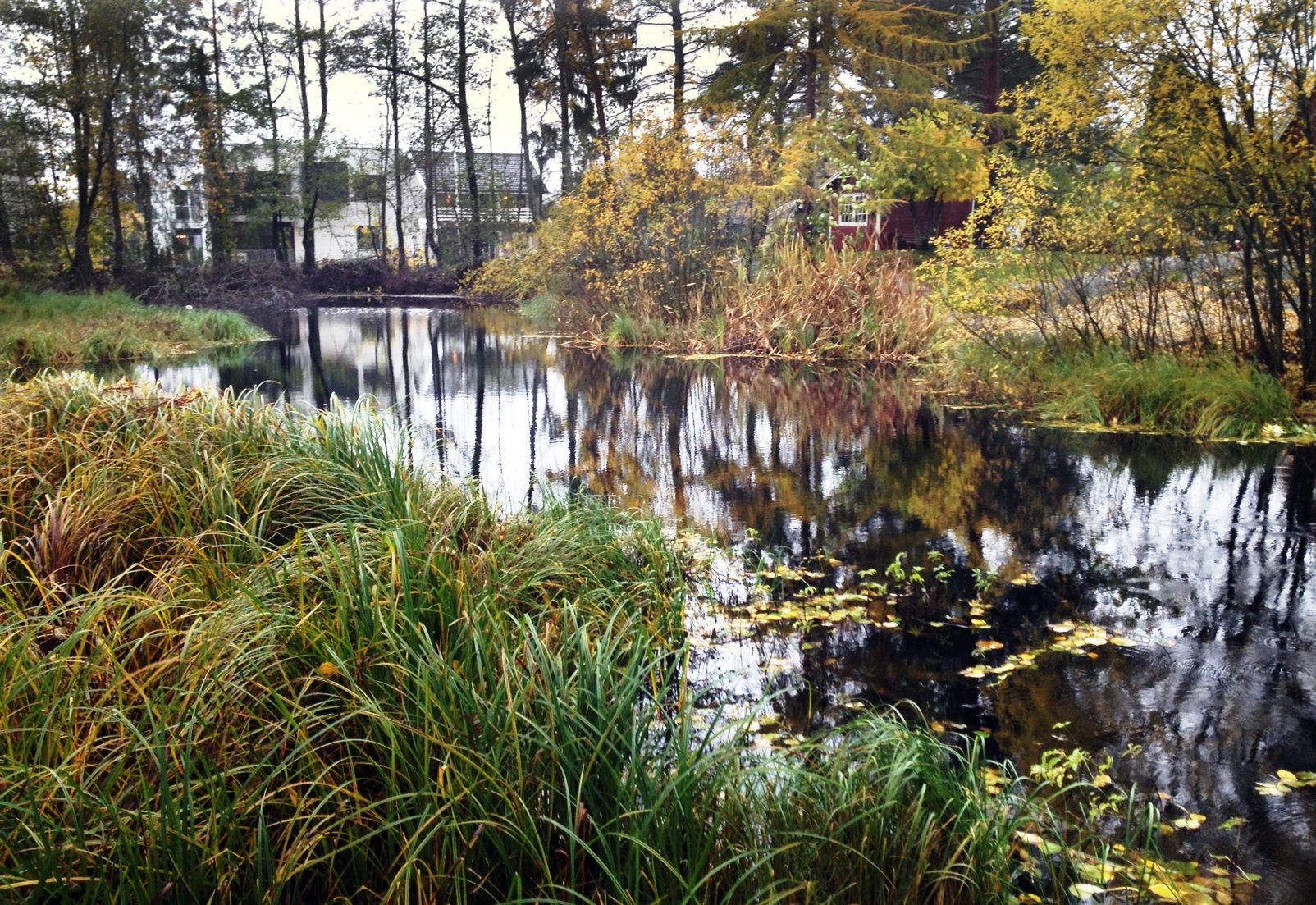 Postdammen på Nordstrand, 2014